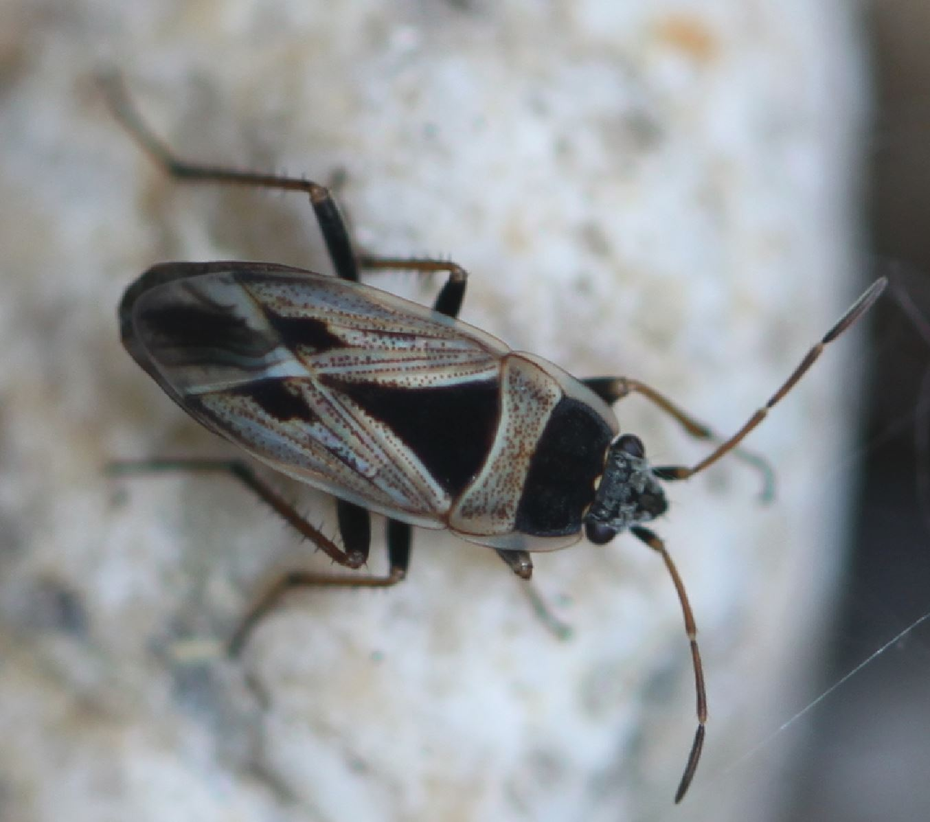 Wanze Xanthochilus quadratus, am 13. Juli 2019 nahe Heidelberg